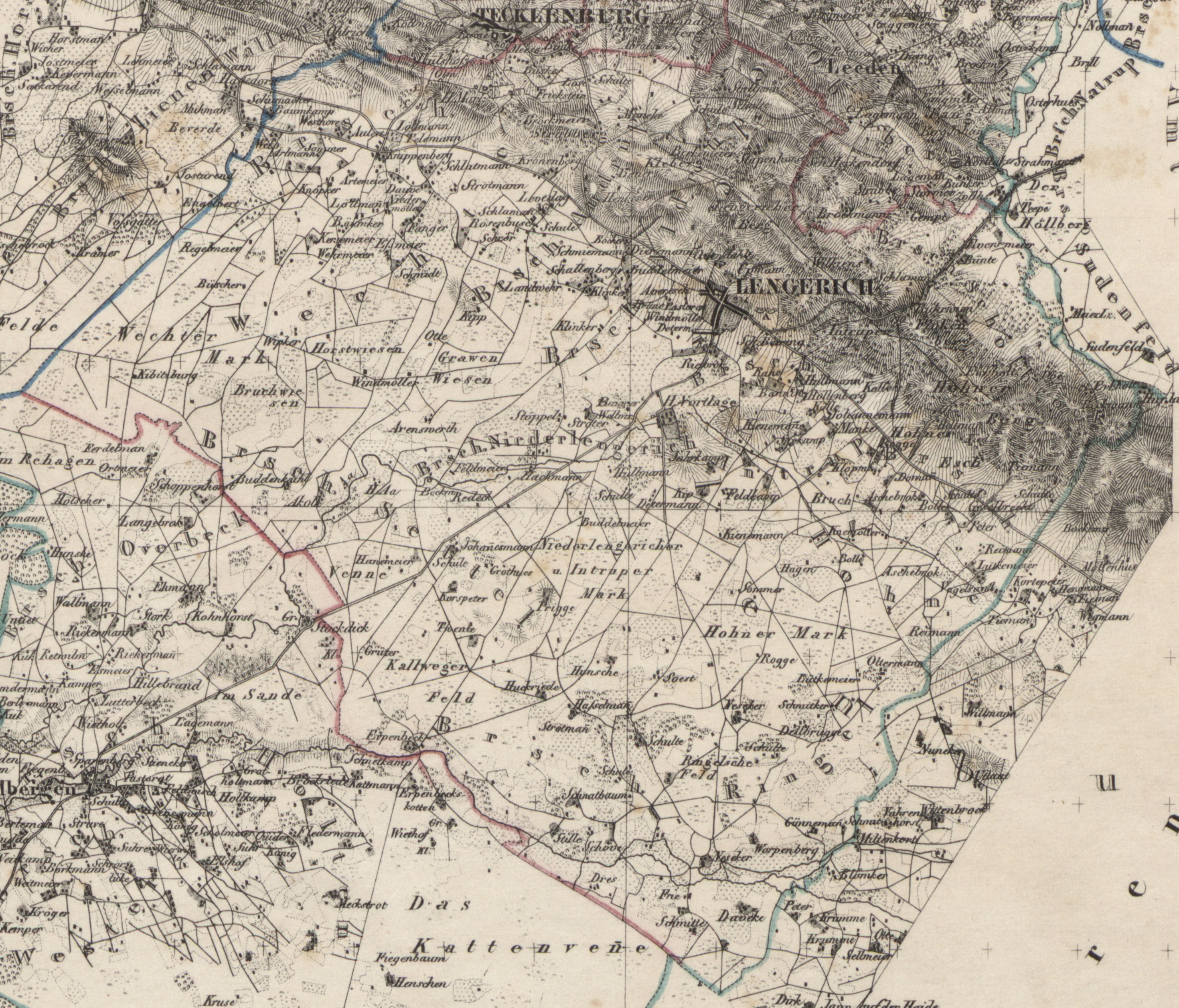 Location of Stadt and Landgemeinde Lengerich